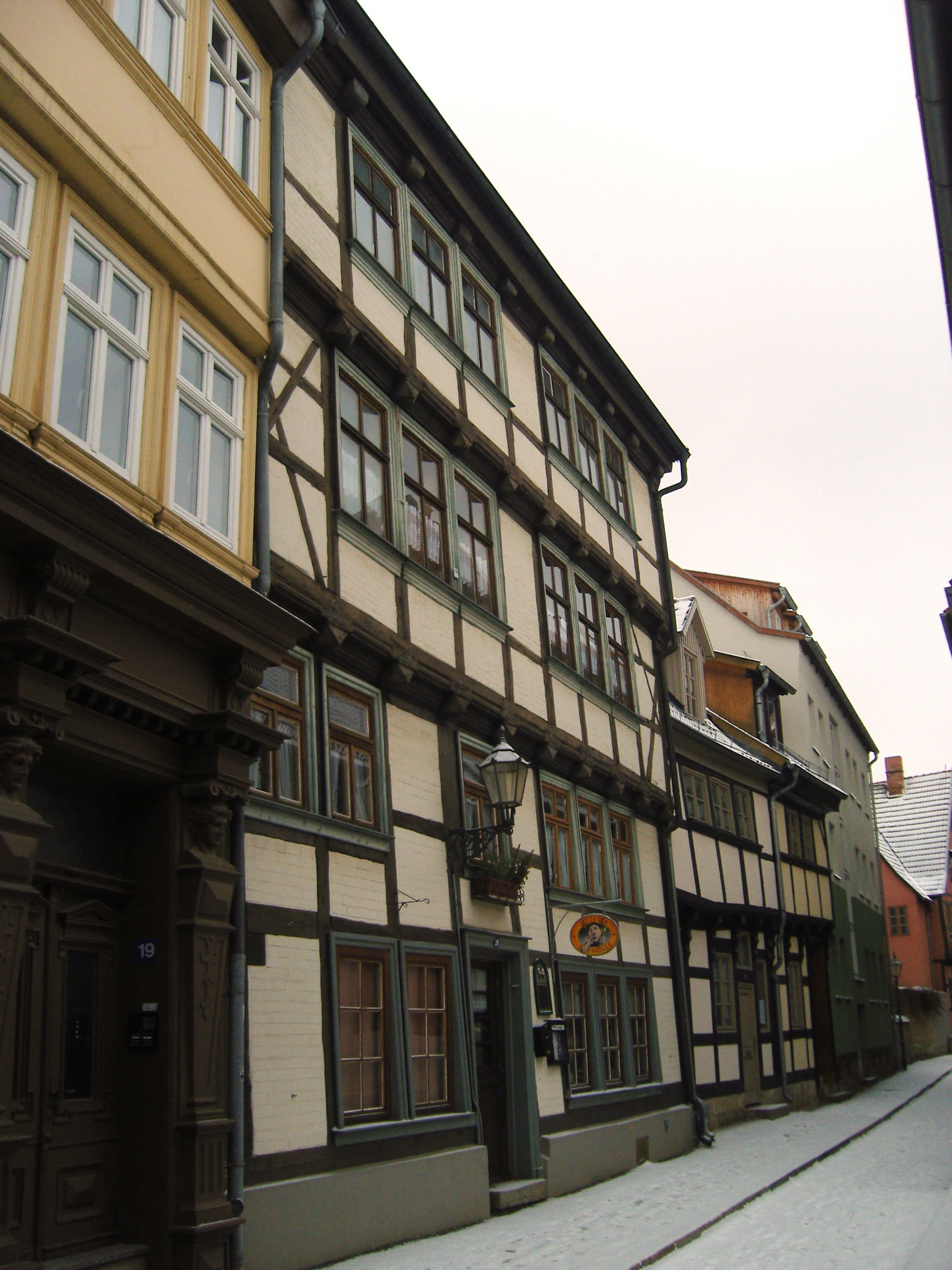 Denkmalgeschützter ehemaliger Ackerbürgerhof in der Straße Stieg 20 in Quedlinburg